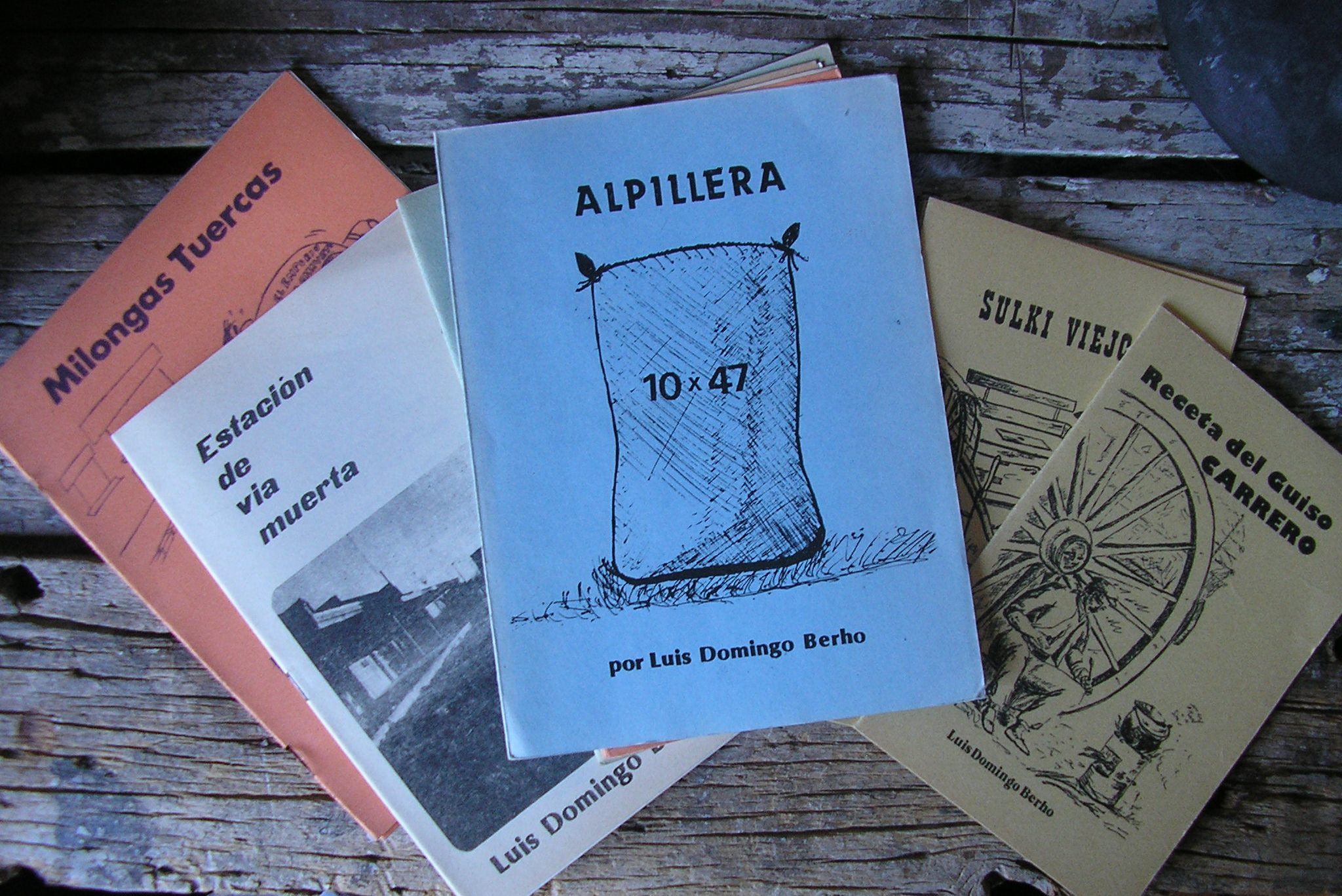 Tapas de libros de Luis Domingo Berho.